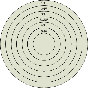 Niveaus van databasenormaalvormen